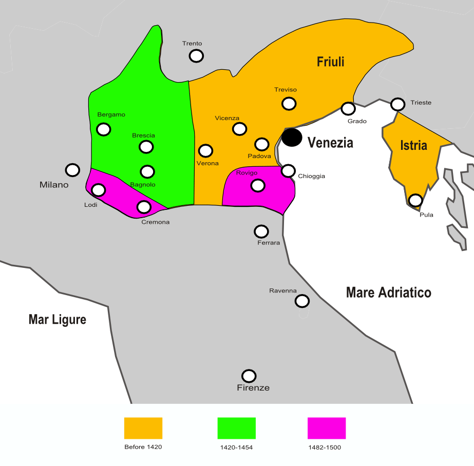 Terra Ferma (Venice)